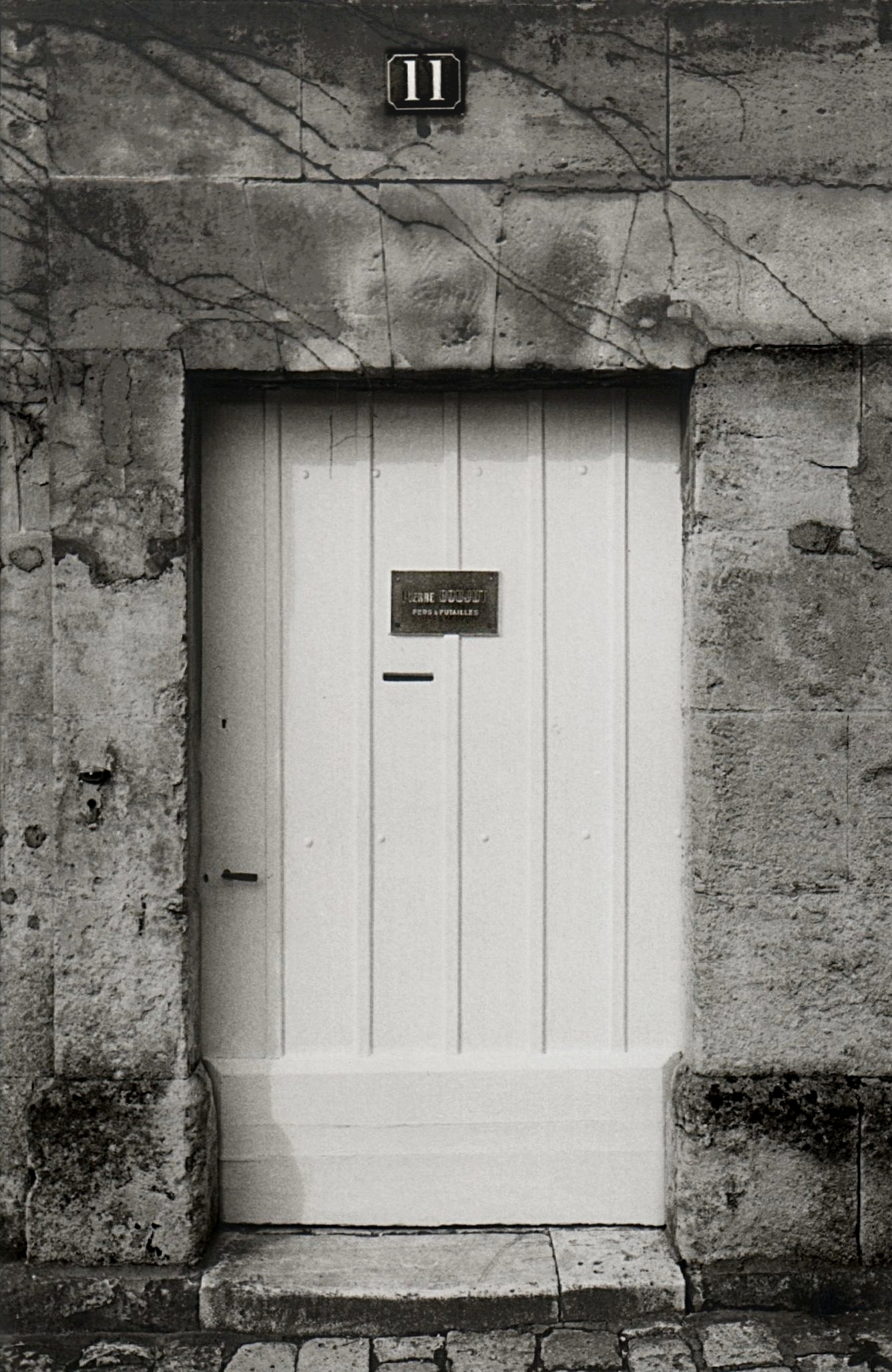 L'entrée du 11, rue Laporte-Bisquit en 1983. La plaque porte la mention : "Pierre Boujut, fers et futailles". Jarnac, Charente, France.